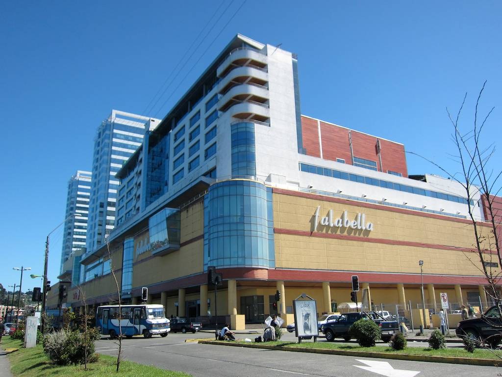 Mall Paseo Costanera